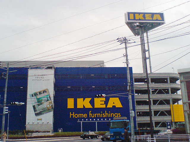 IKEA Funabashi Japan